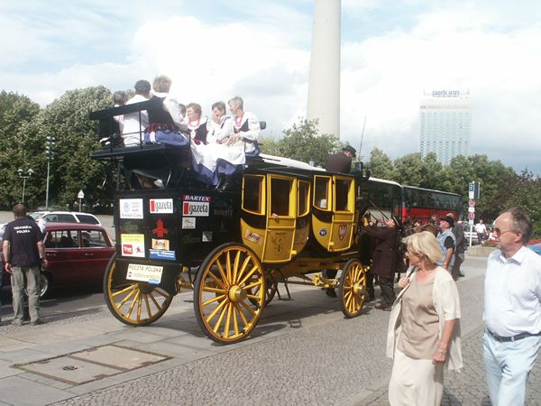 Toeristische postkoets in Berlijn, Duitsland